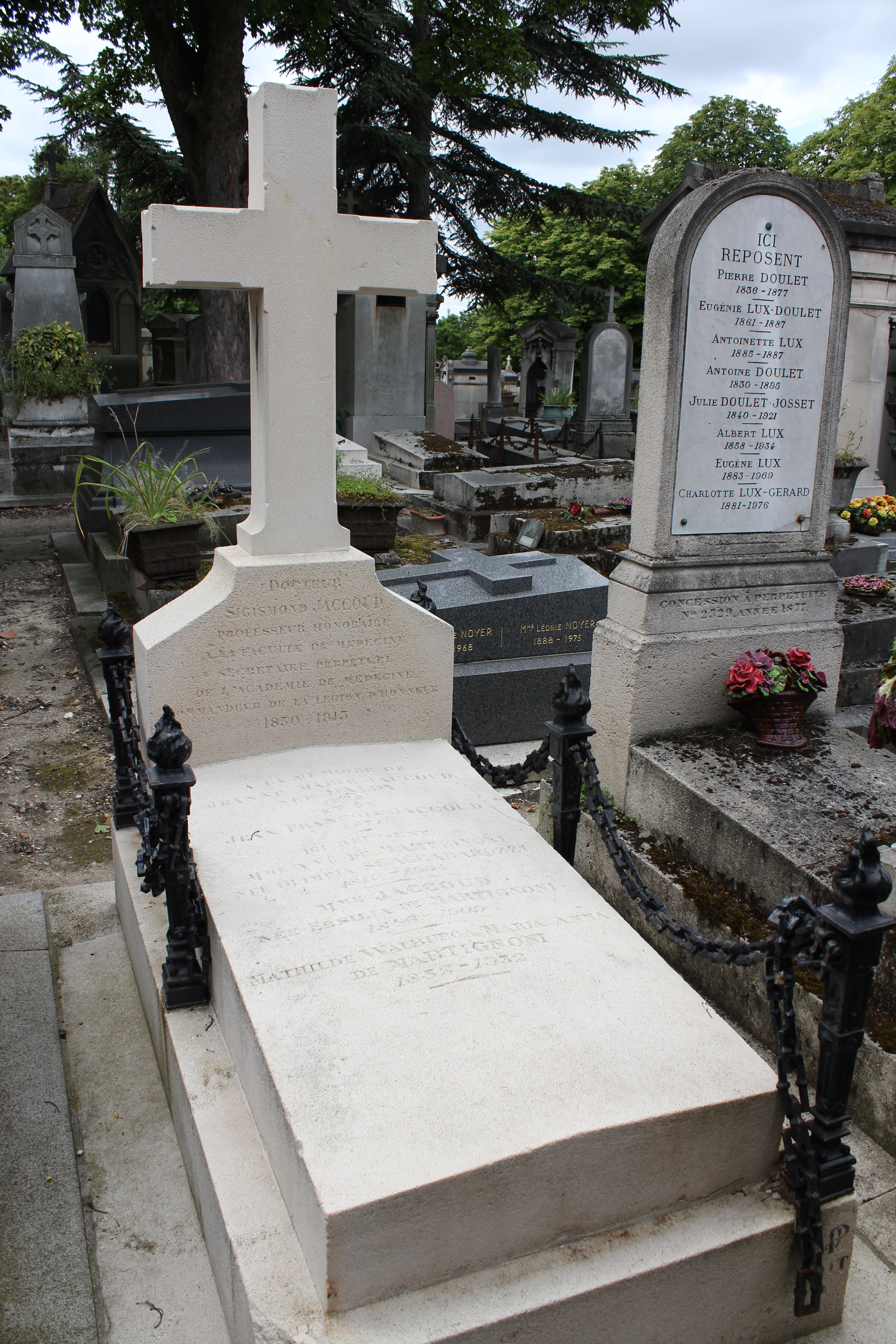 Vue d'ensemble